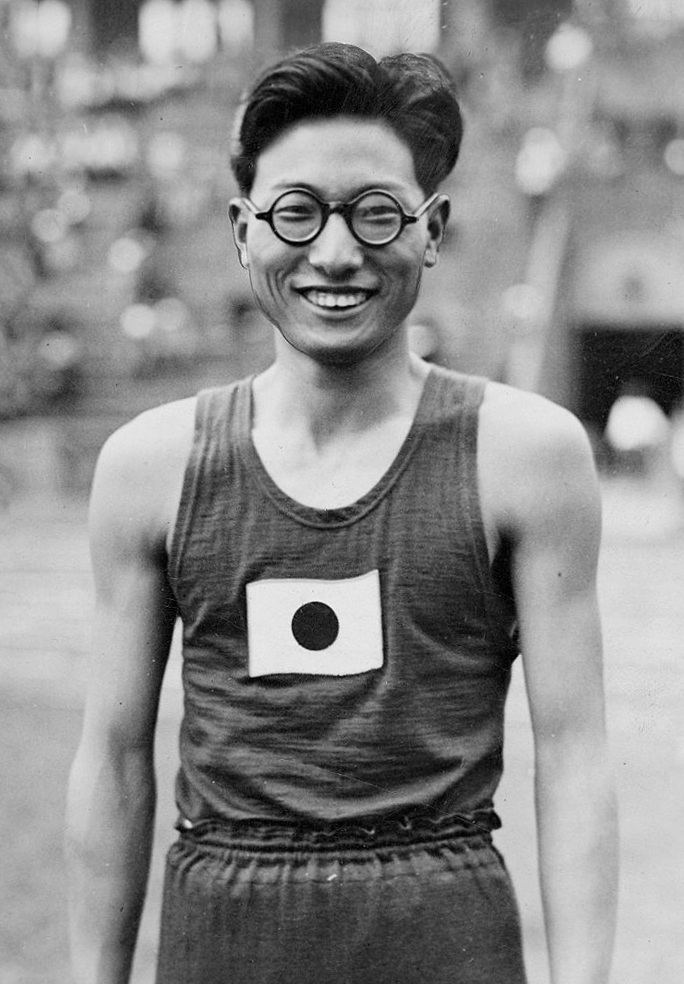 Kenkichi Oshima